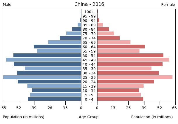 CH